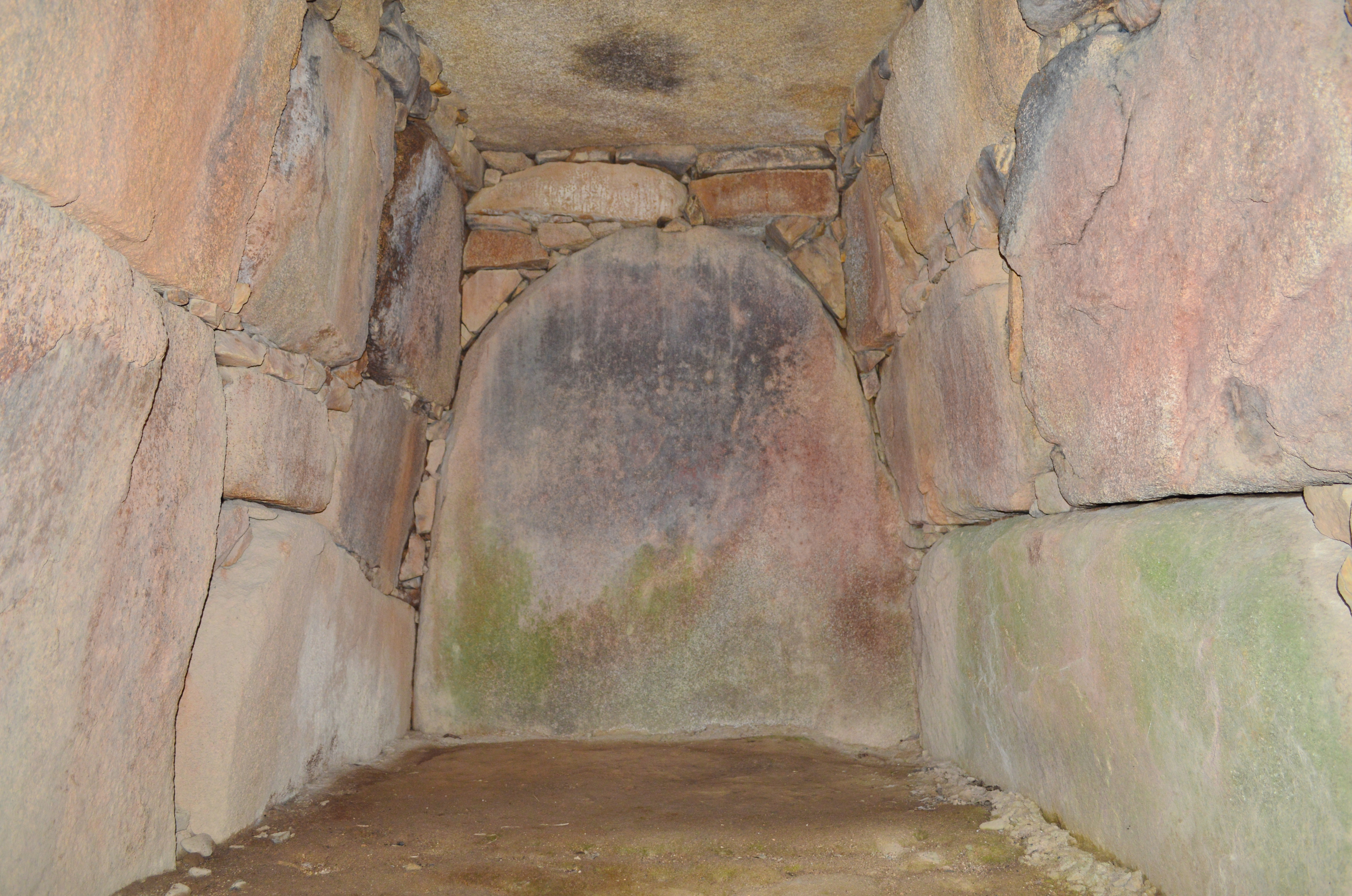 岩畠古墳 石室玄室